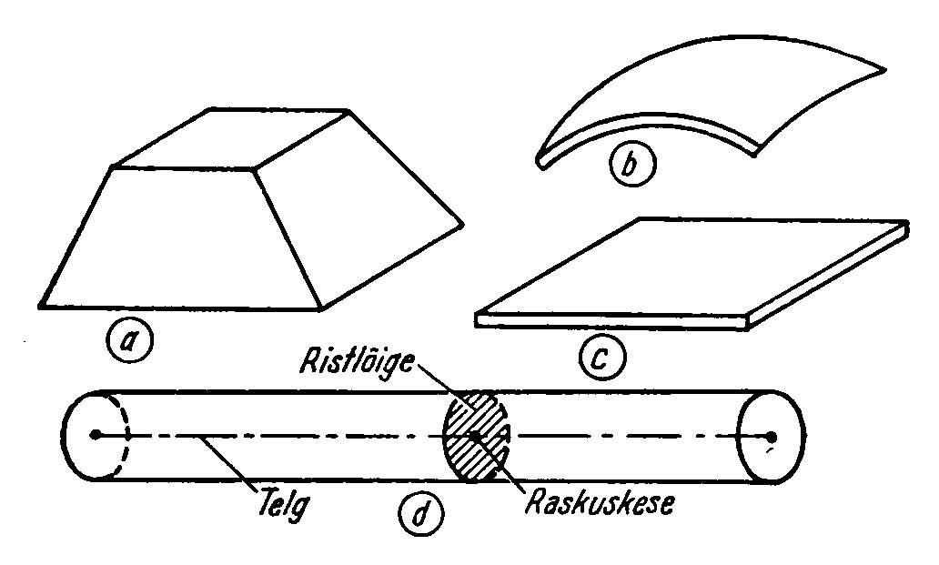 Tugevusopetus-detailid